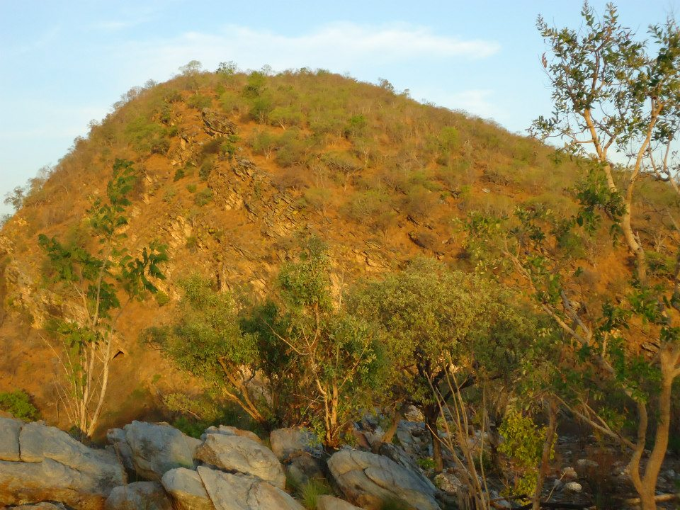 Diversidade florística no Boqueirão do Rio Salgado